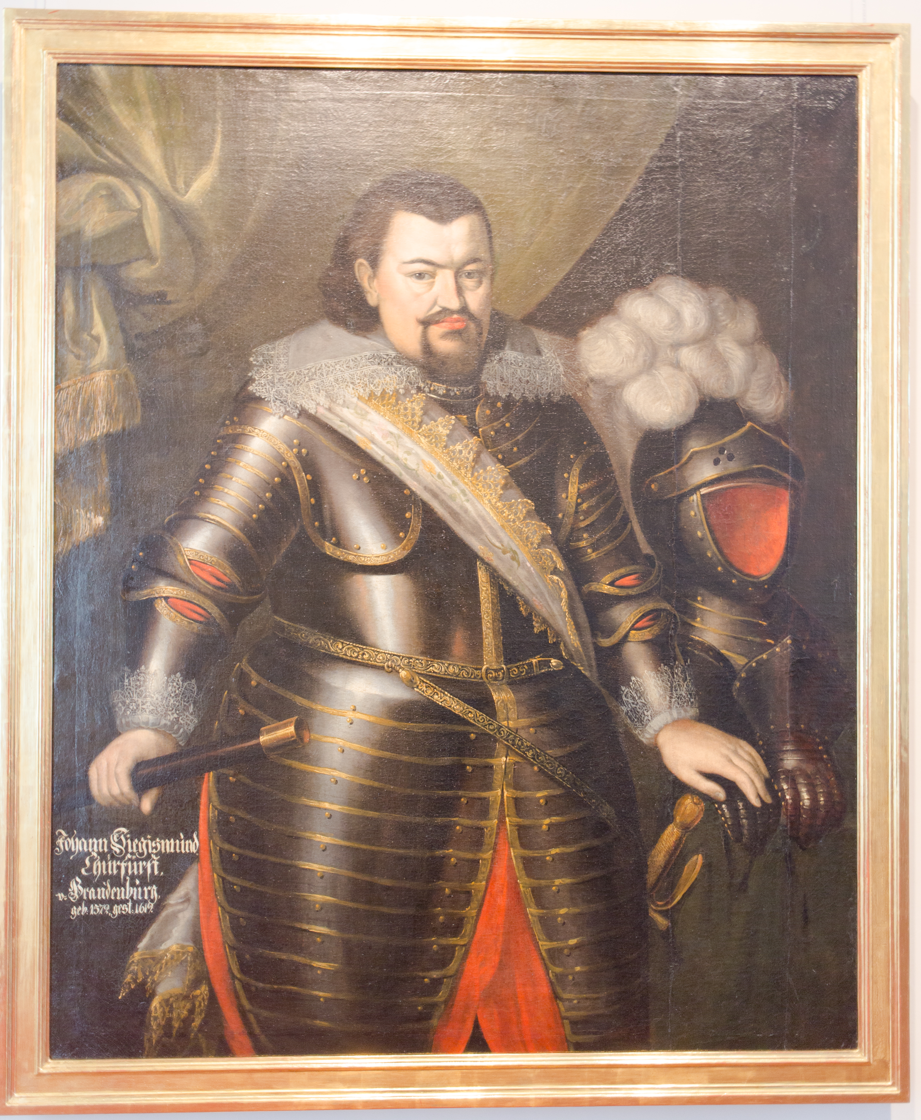 Kurfürst Johann Sigismund von Brandenburg. Um 1610 Ehemals Hohenzollernmuseum